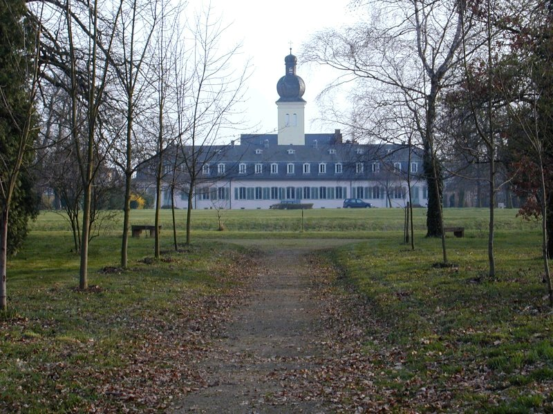 Schloß Braunshardt mit Schloßgarten